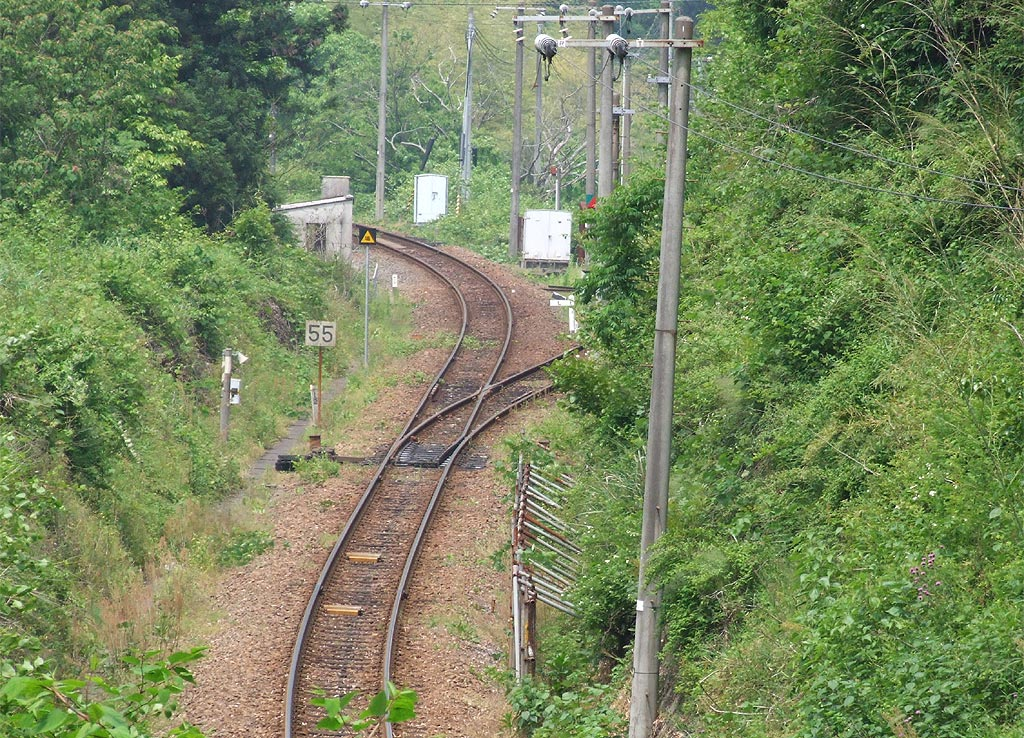 西日本旅客鉄道森ヶ原信号場